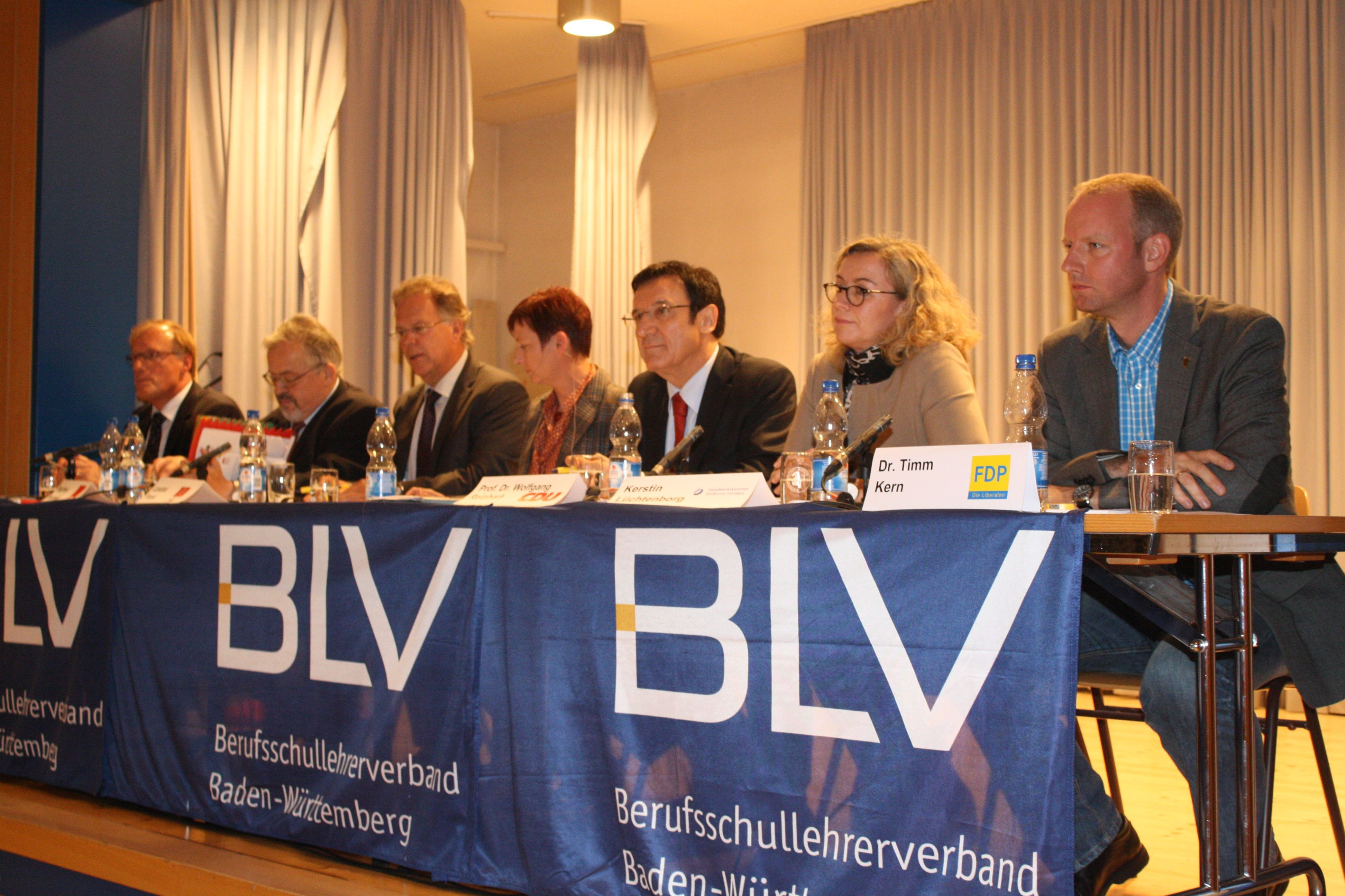 Herbert Huber (BLV Vorsitzender), Siegfried Neumann (SPD), Reinhard Frank (Landrad des Main-Tauber-Kreises), Heike von Brandenstein (Moderatorin), Prof. Dr. Wolfgang Reinhart (CDU), Kerstin Lüchtenborg (Handwerkskammer) und Timm Kern (FDP) auf einer BLV-Podiumsdiskussion in Tauberbischofsheim 2012. Der gemeldete Teilnehmer der Grünen musste aus gesundheitlichen Gründen absagen. Organisiert vom Berufsschullehrerverband Baden-Württemberg und der Kaufmännischen Schule Tauberbischofsheim